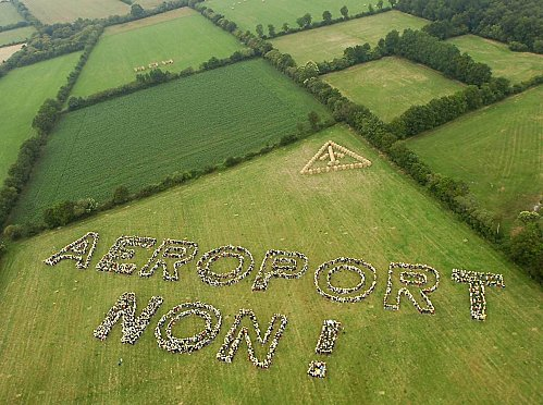 Fresque humaine du 25 juin 2006 contre le projet d'aéroport de Notre Dames des Landes (aéroport du grand ouest) en France.